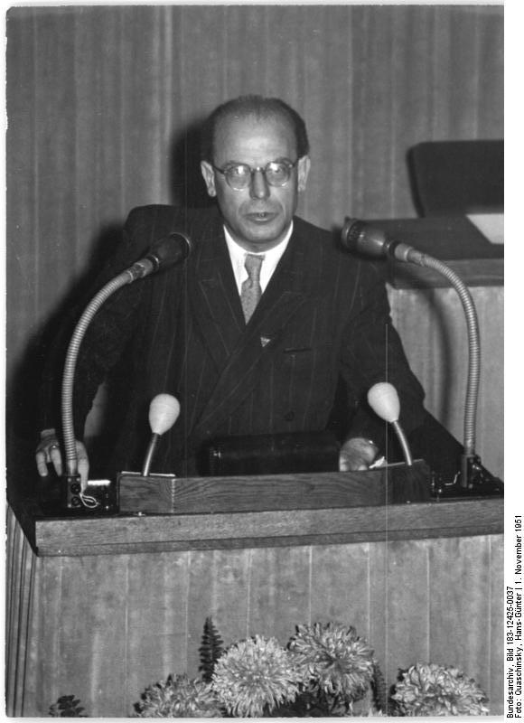 Illus/Quaschinsky 1.11.51 13. und 14. Sitzung der Volkskammer Die Volkskammer der DDR trat am 31.10.51 und 1.11.51 zu ihrer 13. und 14. Sitzung zusammen, um u.a. über das "Gesetz über den Fünfjahresplan zur Entwicklung der Volkswirtschaft der Deutschen Demokratischen Republik", den "Rechenschaftsbericht der Regierung über die Einnahmen der Republik und ihre Verwendung für das Rechnungsjahr 1950" und das "Gesetz über die Deutsche Notenbank" zu beraten. UBz: Für die VVN sprach der Abgeordnete Beyling.